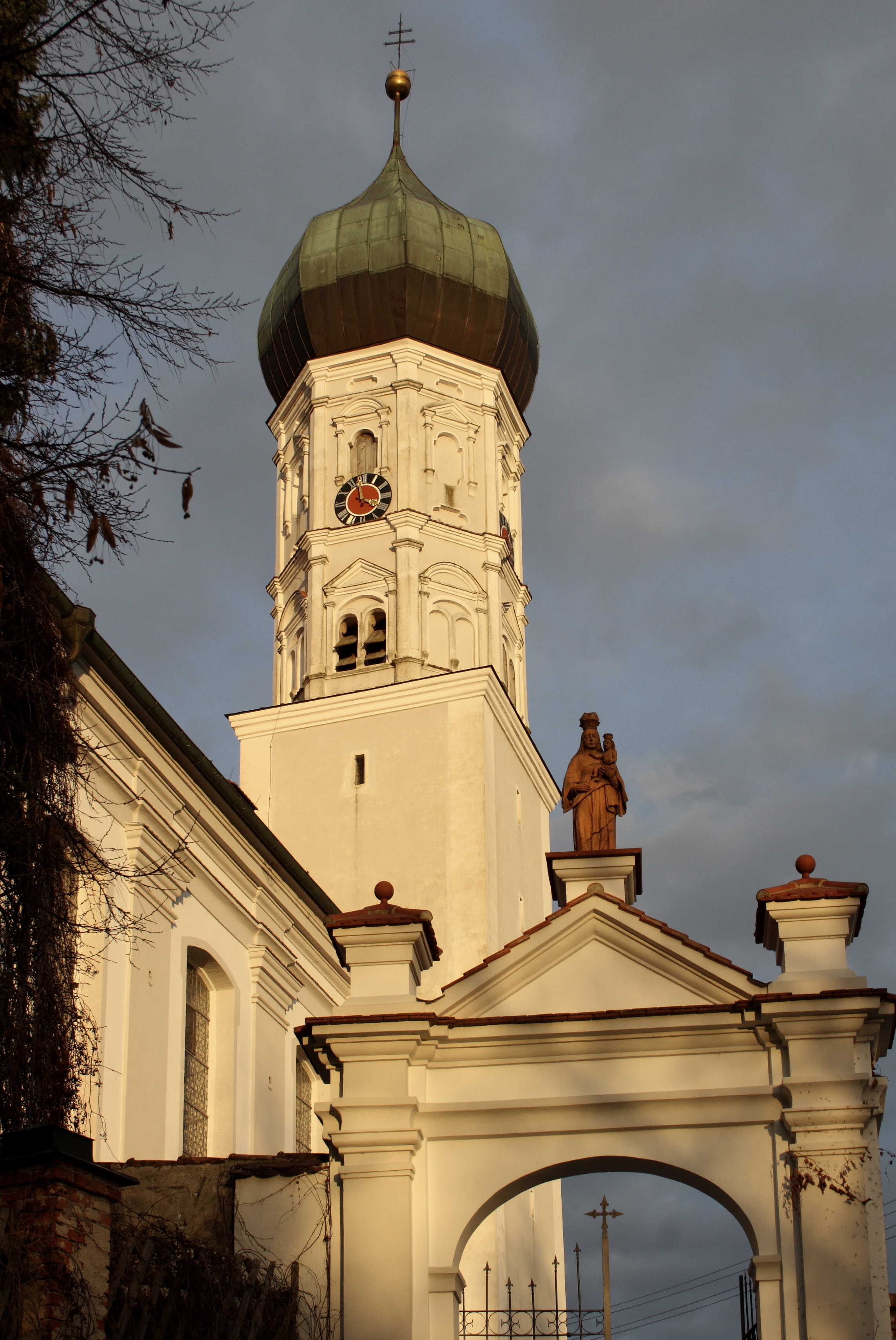 Ehemalige Damenstiftskirche, katholische Pfarrkirche St. Johannes Baptist und Johannes Evangelist in Edelstetten in der Gemeinde Neuburg an der Kammel im Landkreis Günzburg (Bayern), Zwiebelturm und Friedhofsportal mit Marienfigur um 1710